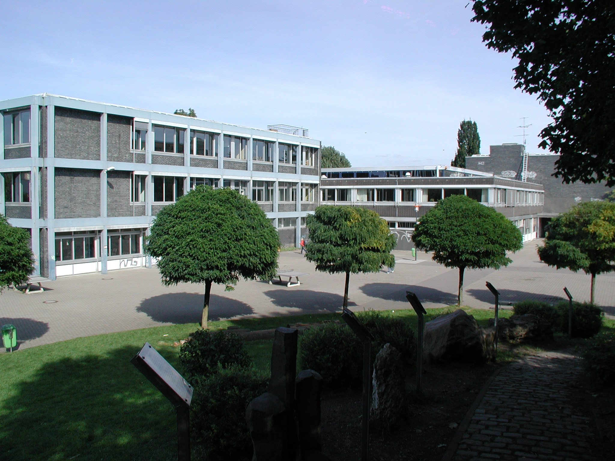 Ernst-Mach-Gymnasium, Hürth